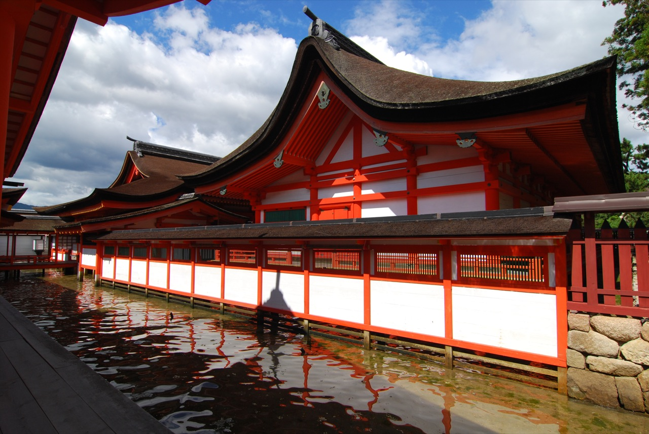 Itsukushima jinjya (shrine), Miyajima, Hiroshima, Japan 1241-1602 ???? ????????? ??????????????????????????????????????????? Nikon D40x